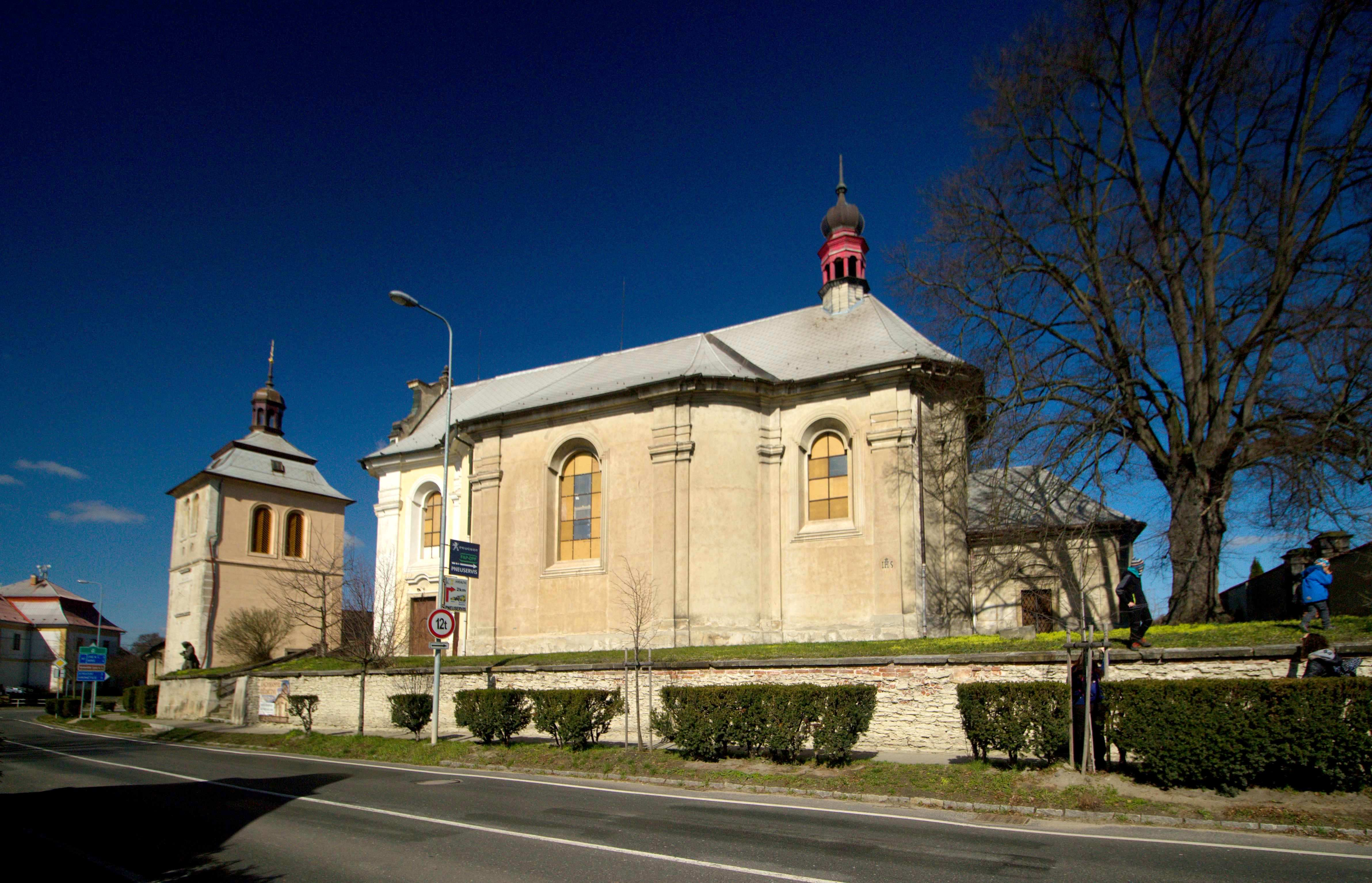 Kostomlaty nad Labem, okres Nymburk